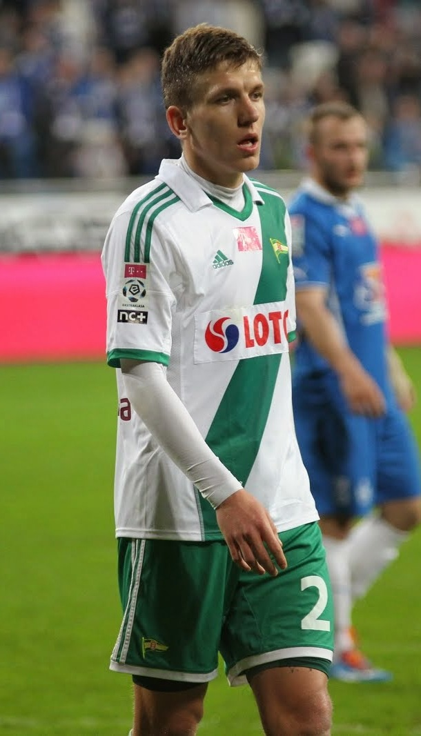 Rafał Janicki w barwach Lechii Gdańsk.